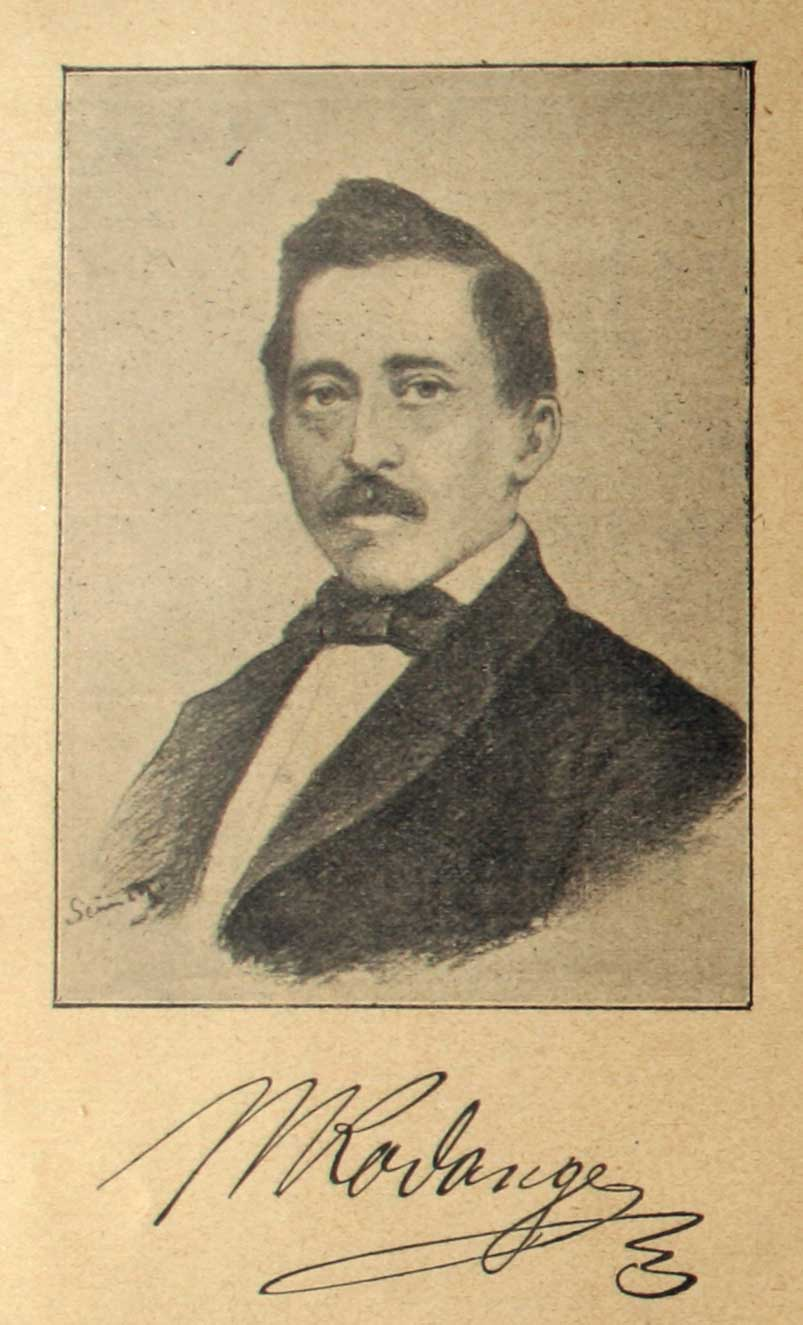 Sujet: Méchel Rodange aus der zweeter oplo vum Reenert vun 1909.